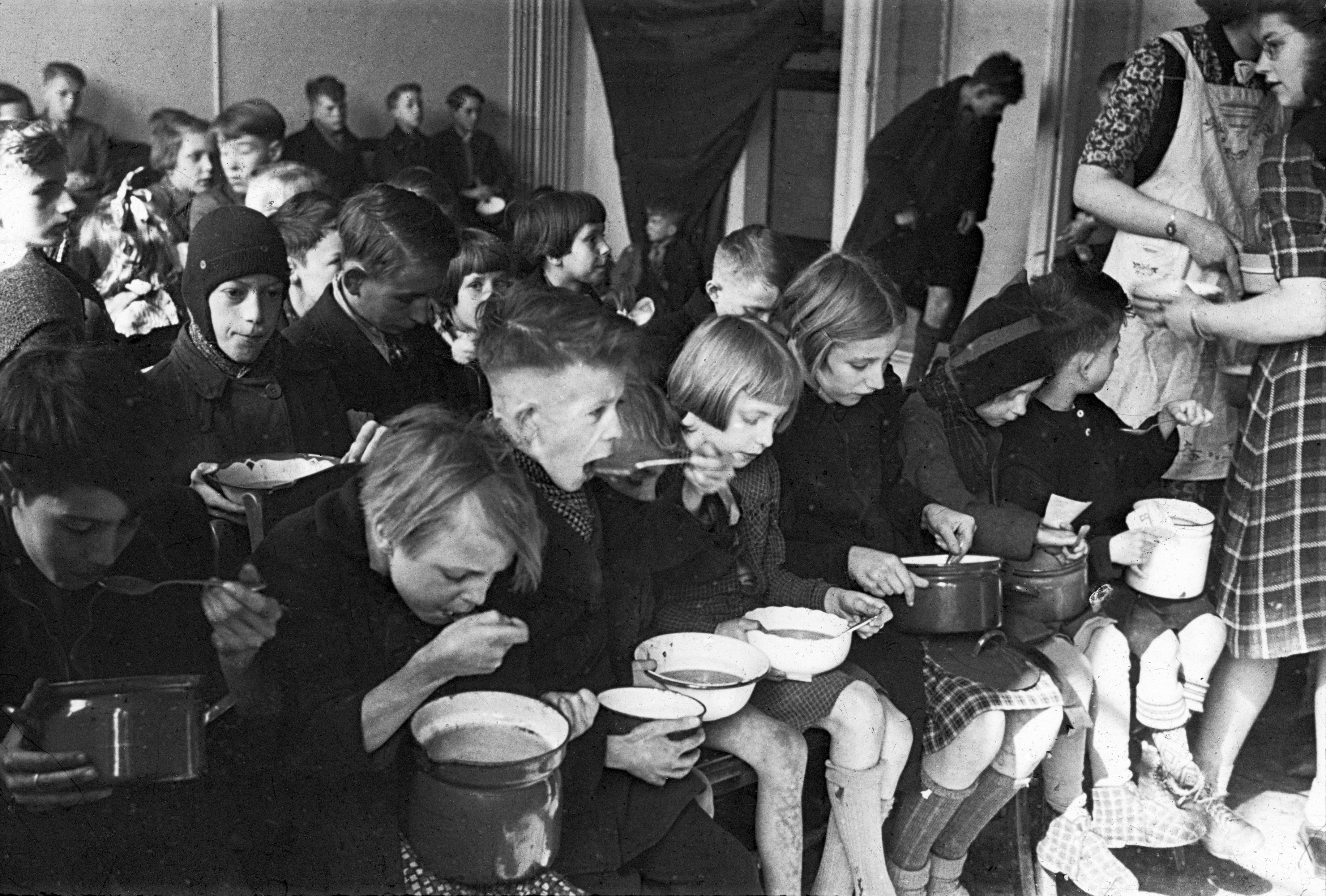 Foto uit de collectie Huizinga van het NIOD. Kinderen eten een halve liter bijvoeding per dag tijdens de Hongerwinter, verschaft door het Interkerkelijk Bureau. Menno Huizinga was onderdeel van de Ondergedoken Camera en maakte illegaal foto’s tijdens de bezetting. Dit deed hij hoofdzakelijk in zijn woonplaats Den Haag.